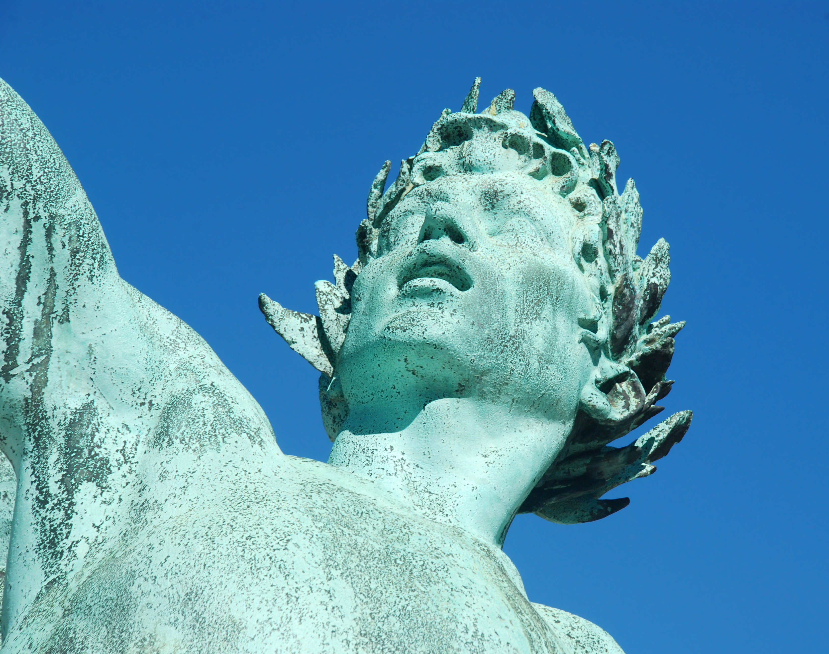 Belgique - Bruxelles - Jardin botanique de Bruxelles - Le Laurier de Julien Dillens This photo of immovable heritage has been taken in the Brussels Capital Region